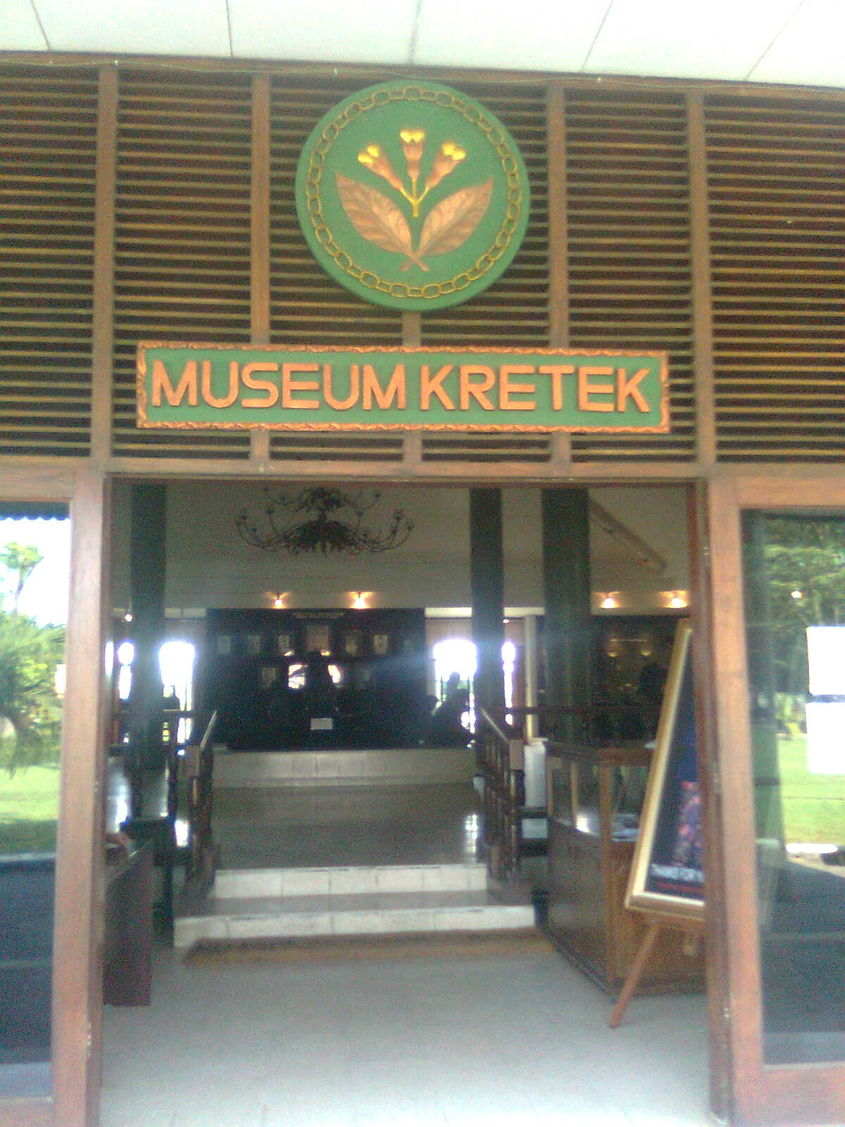 museum kretek